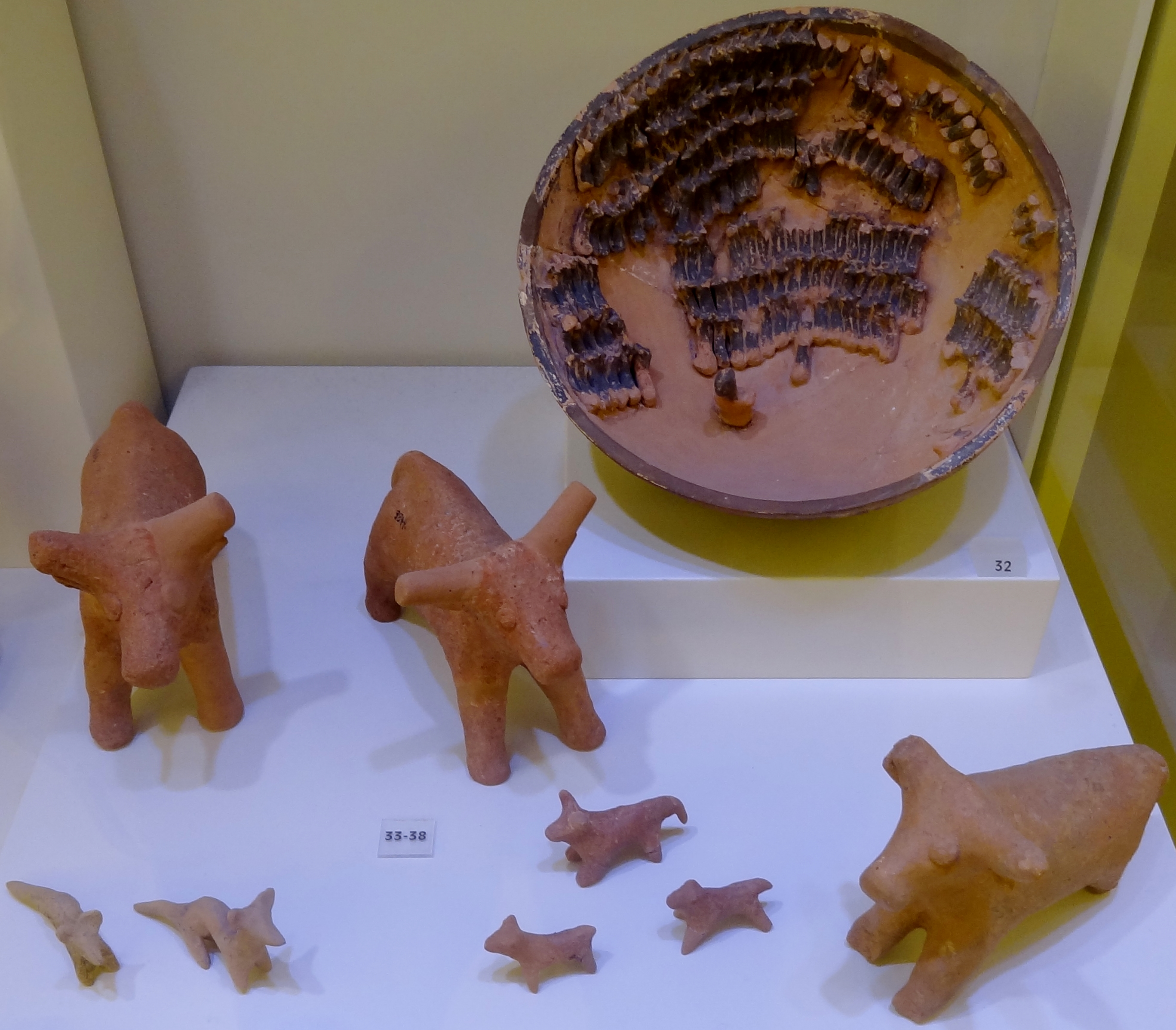 Halbkugelförmiges Gefäß mit auf der Innenseite aufgesetzten Figuren einer Schafherde mit Schäfer (Altpalastzeit, 2000–1800 v. Chr.) aus Palekastro sowie Tonfiguren von Ochsen (Altpalastzeit, 1900–1800 v. Chr.) aus dem Höhenheiligtum von Maza (Kalo Chorio, Pediada), ausgestellt im Archäologischen Museum Iraklio, Kreta, Griechenland